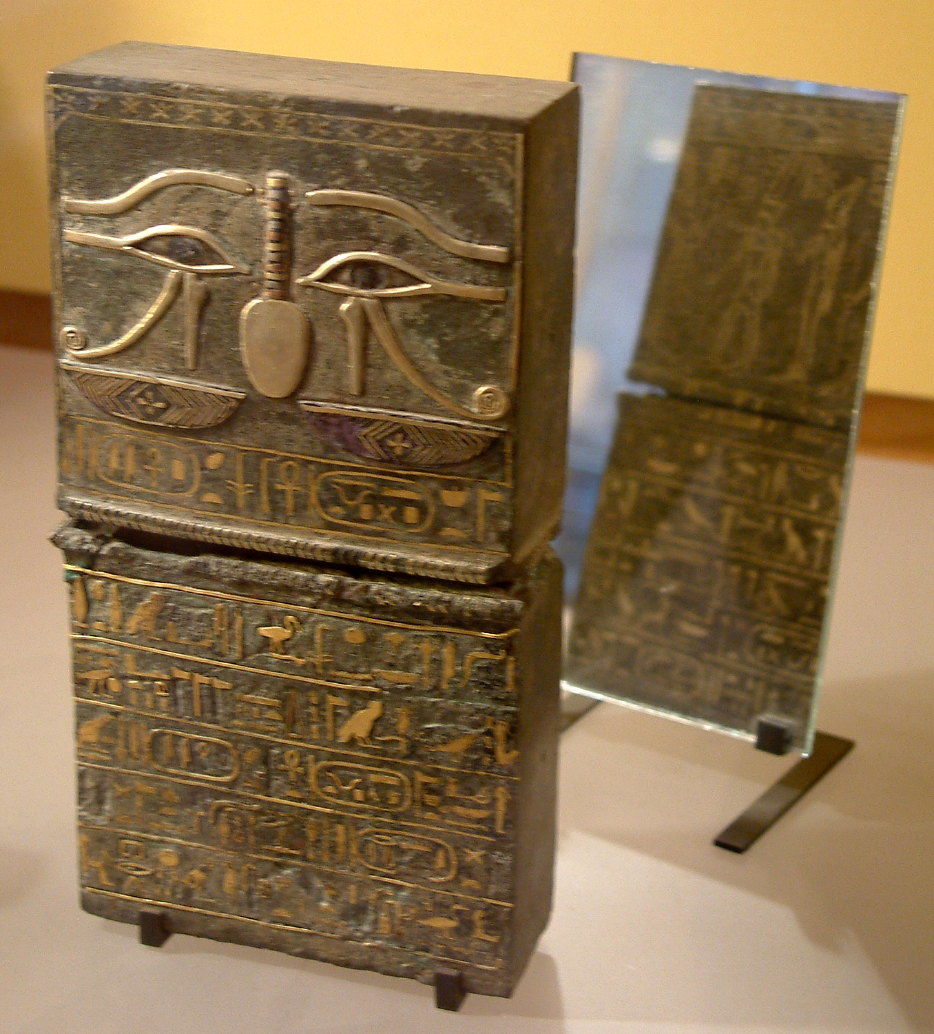 Antiquité égyptienne du musée du Louvre. Boîte au nom de Chépenoupet II. Argent, Bronze, Ivoire,Or.